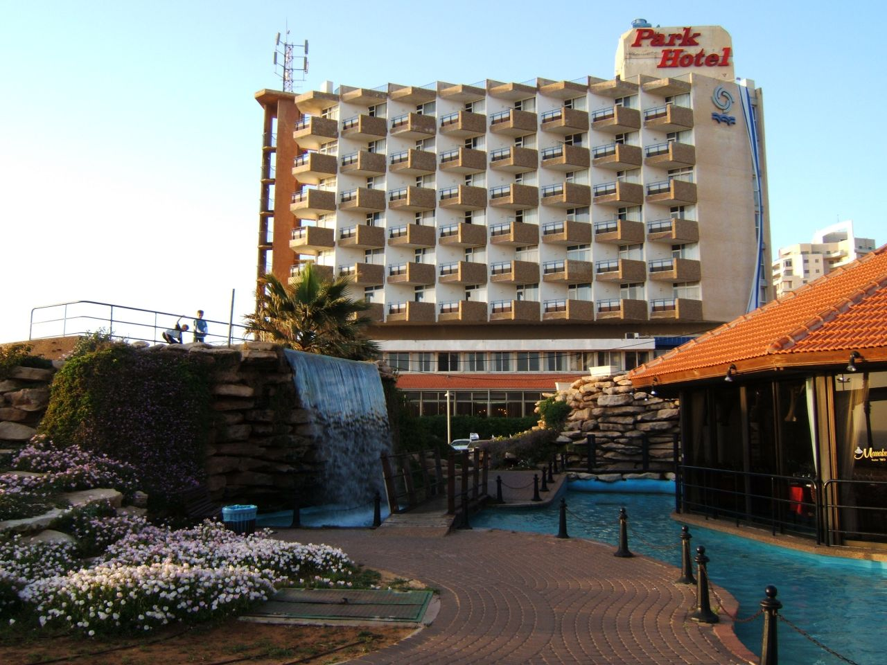 "Парк Отель".Один из многочисленных отелей Натании